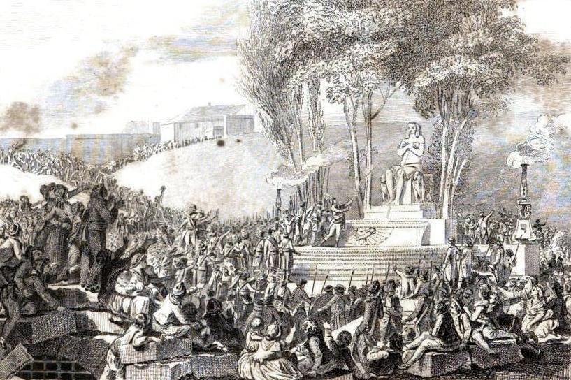 "10 Août 1793 - Fontaine de la Régénération"